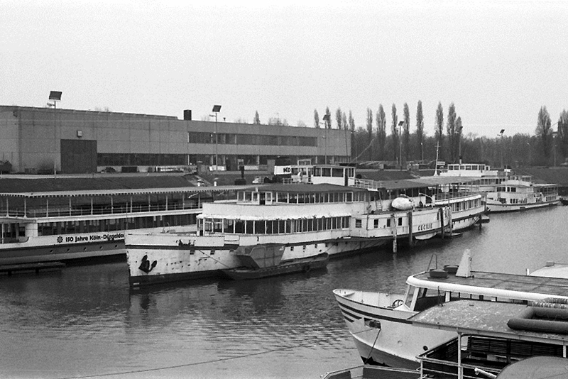 Der stillgelegte Raddampfer Cecilie im April 1978 im Hafen Köln-Niehl.